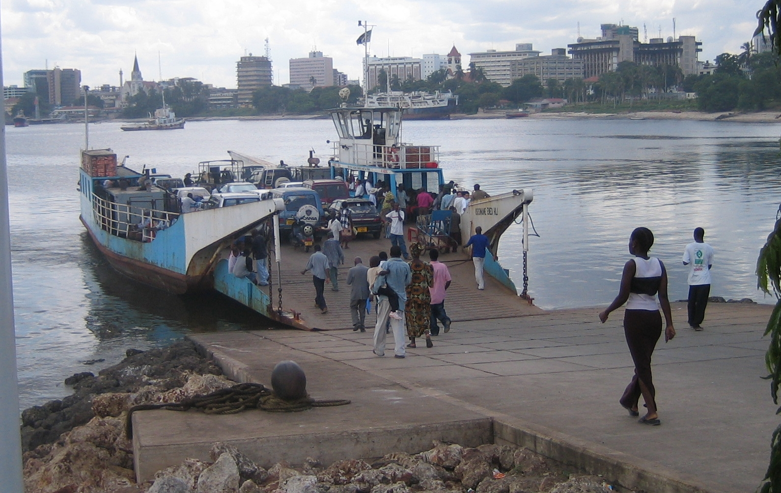 Taken by SteveRwanda